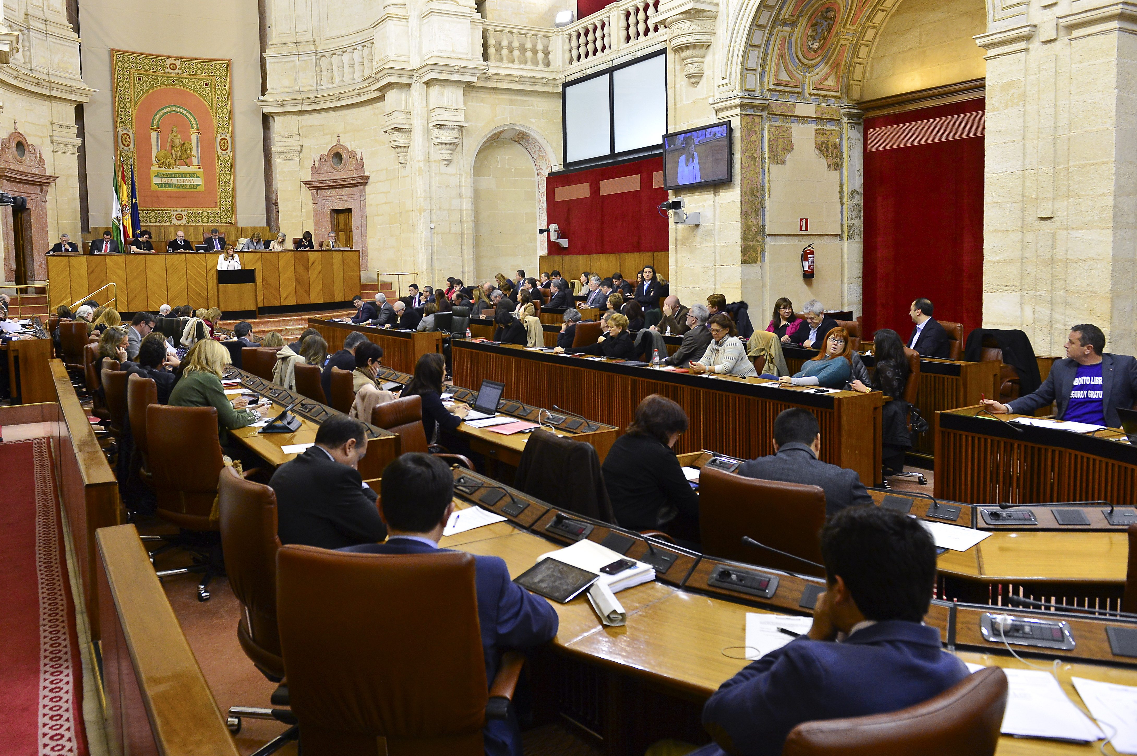 Parlamento de Andalucía en un pleno extraordinario. En la tribuna Susana Díaz.